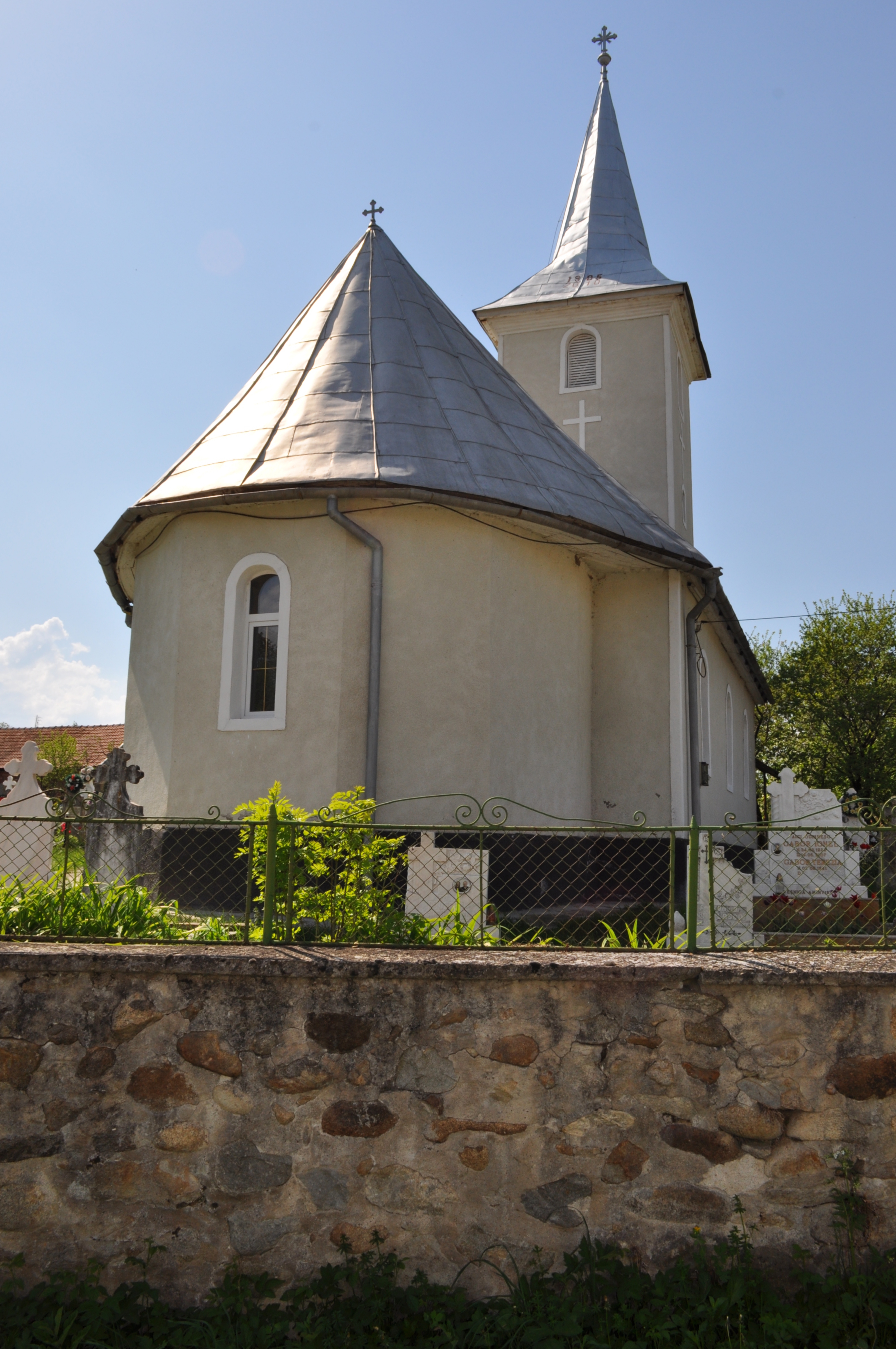 Biserica "Sf. Atanasie şi Chiril", sat SĂLAŞU DE SUS; comuna SĂLAŞU DE SUS